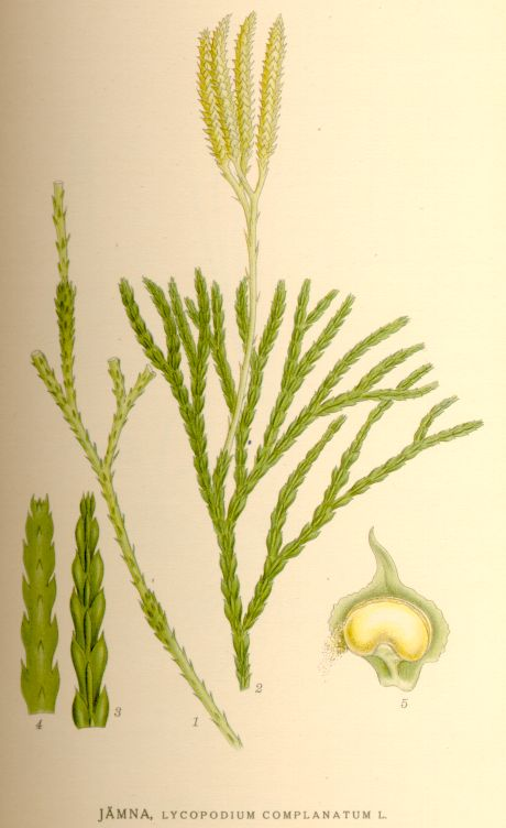 Lycopodium complanatum (syn. Diphasiastrum complanatum)